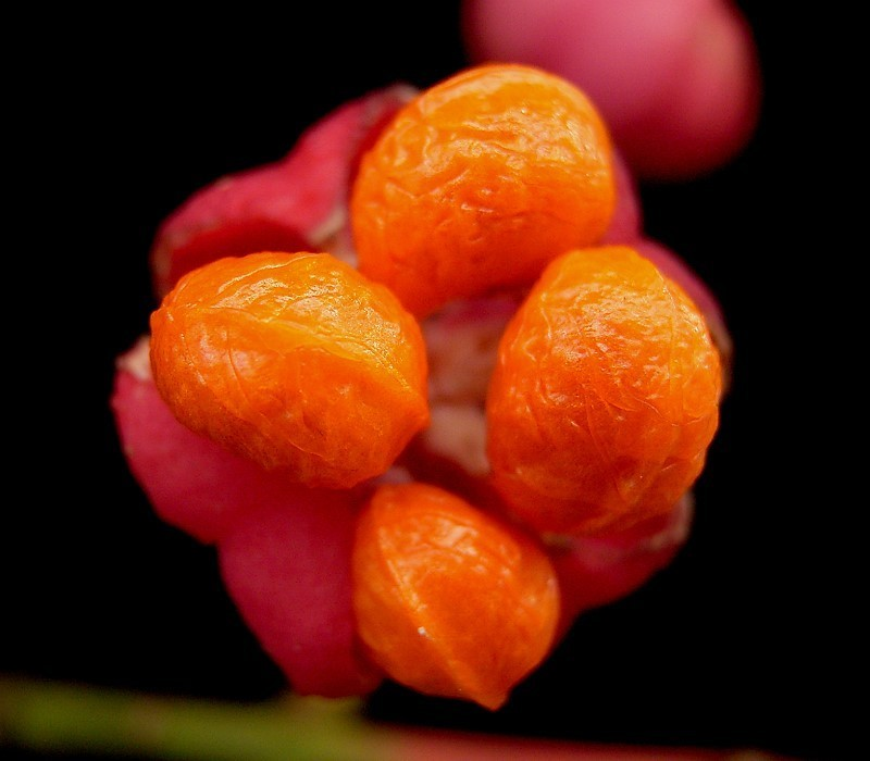 Euonymus europaeus